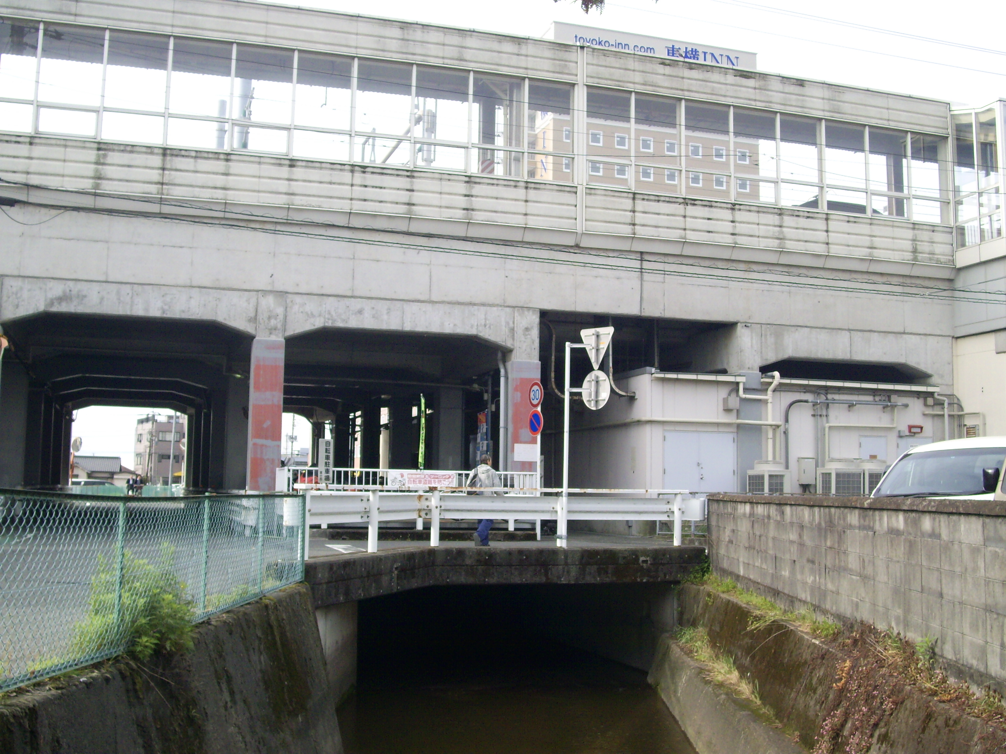 東海道新幹線新富士駅ホーム下を流れる用水路 ㊟カメラを起動すると日付機能が出荷時のものに初期化されるため、ファイル履歴の投稿日時とメタデータの原画像データの生成日時が異なります（本概要欄の下記日付が撮影日）